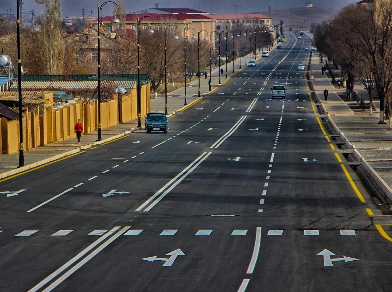 Culfa yolu